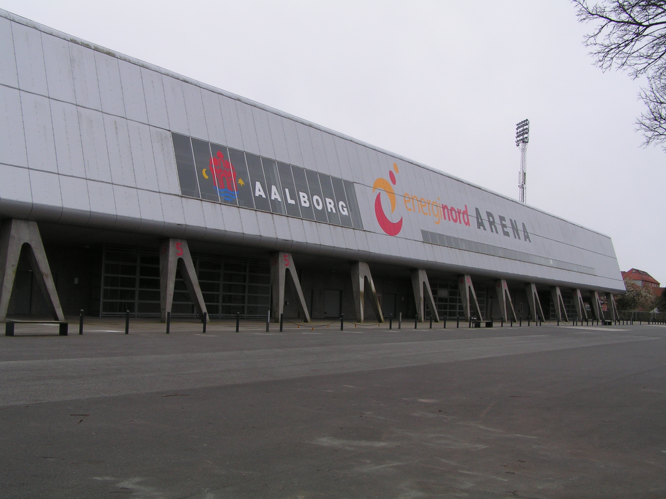 Energi Nord Arena, Aalborg